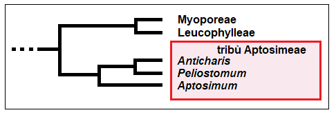 Aptosimeae - Cladogramma della tribù.png